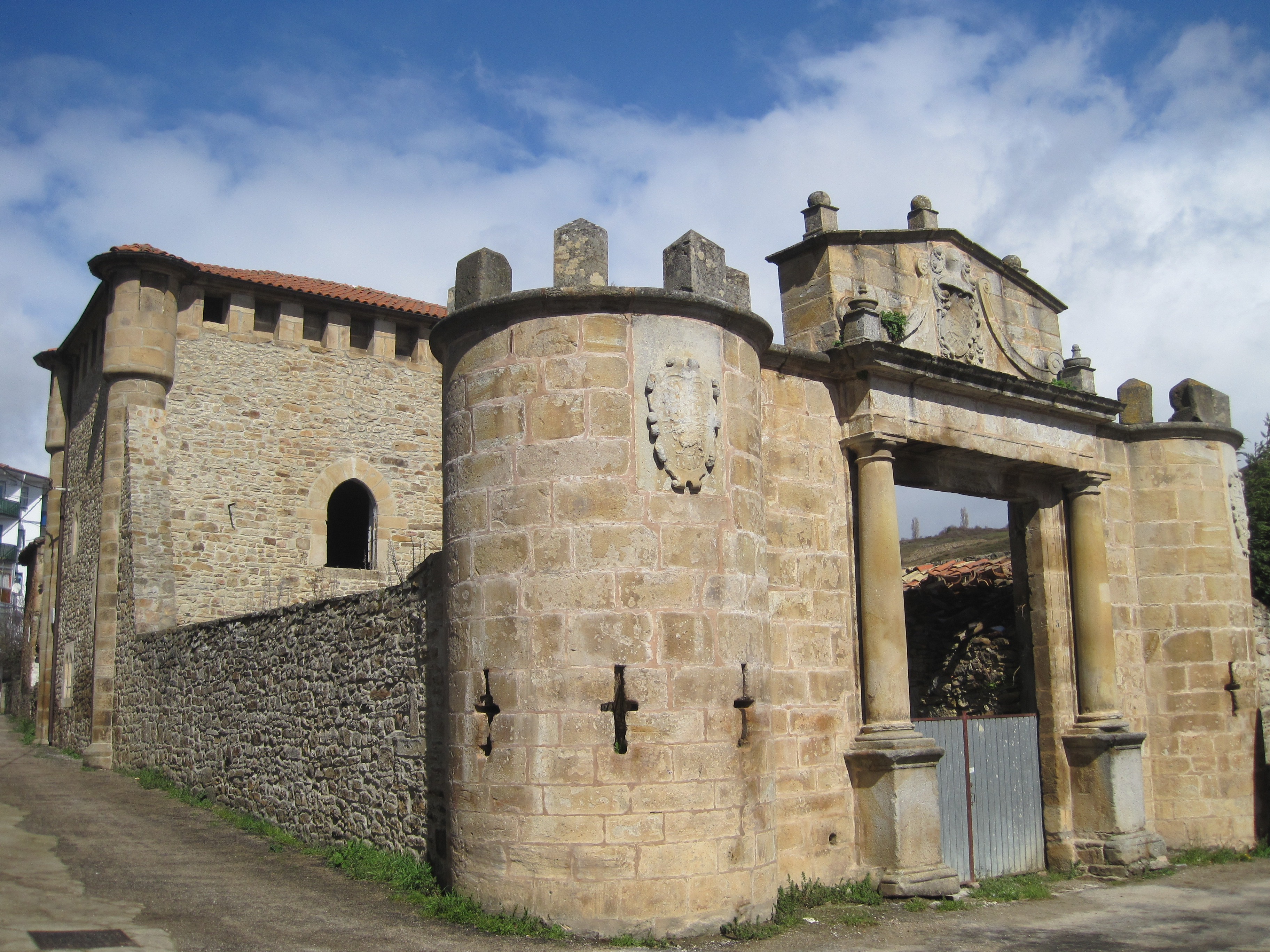 Vista externa desde la entrada principal de las Torre de los Monteros.